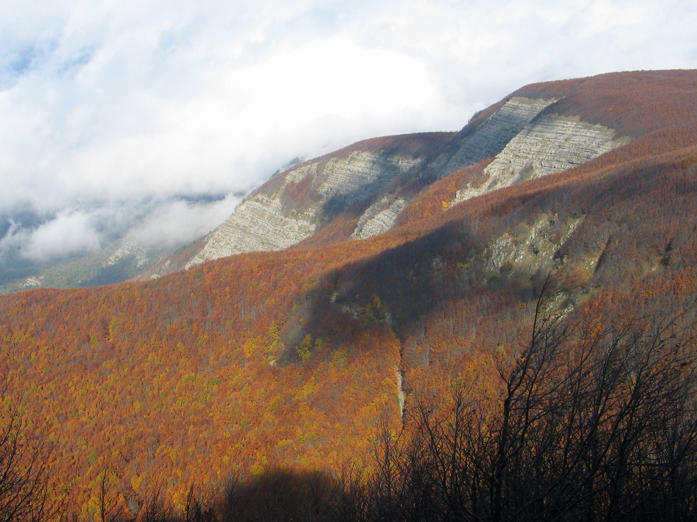 Monte Falterona, Italy